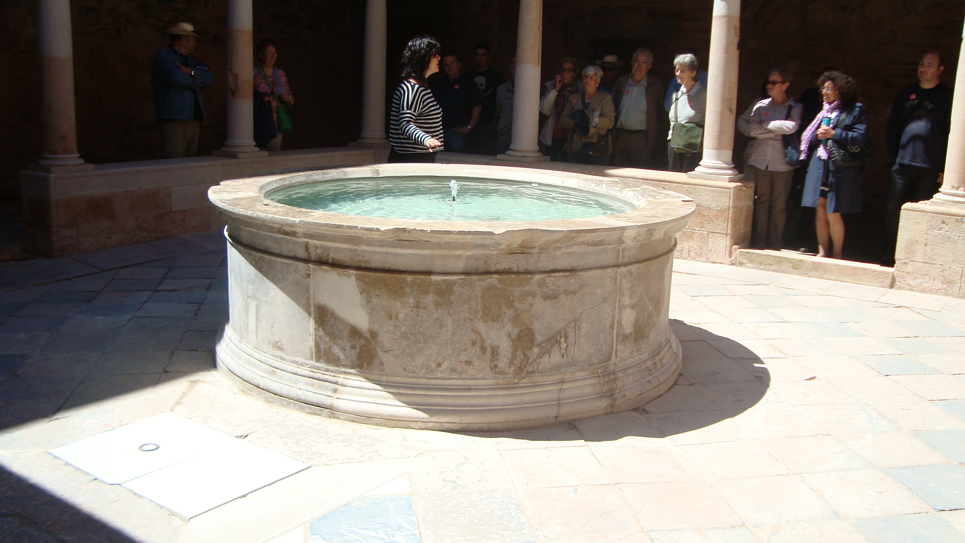 Font del Claustre de Escala Dei